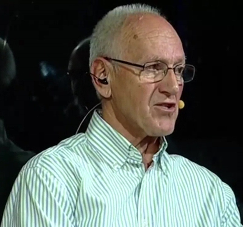 Miroslav Cerar